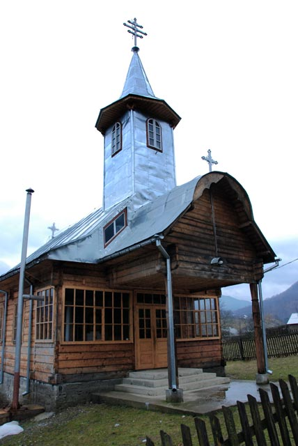 Landestypische Holzkirche von Valea Vişeului, Maramureş, Rumänien